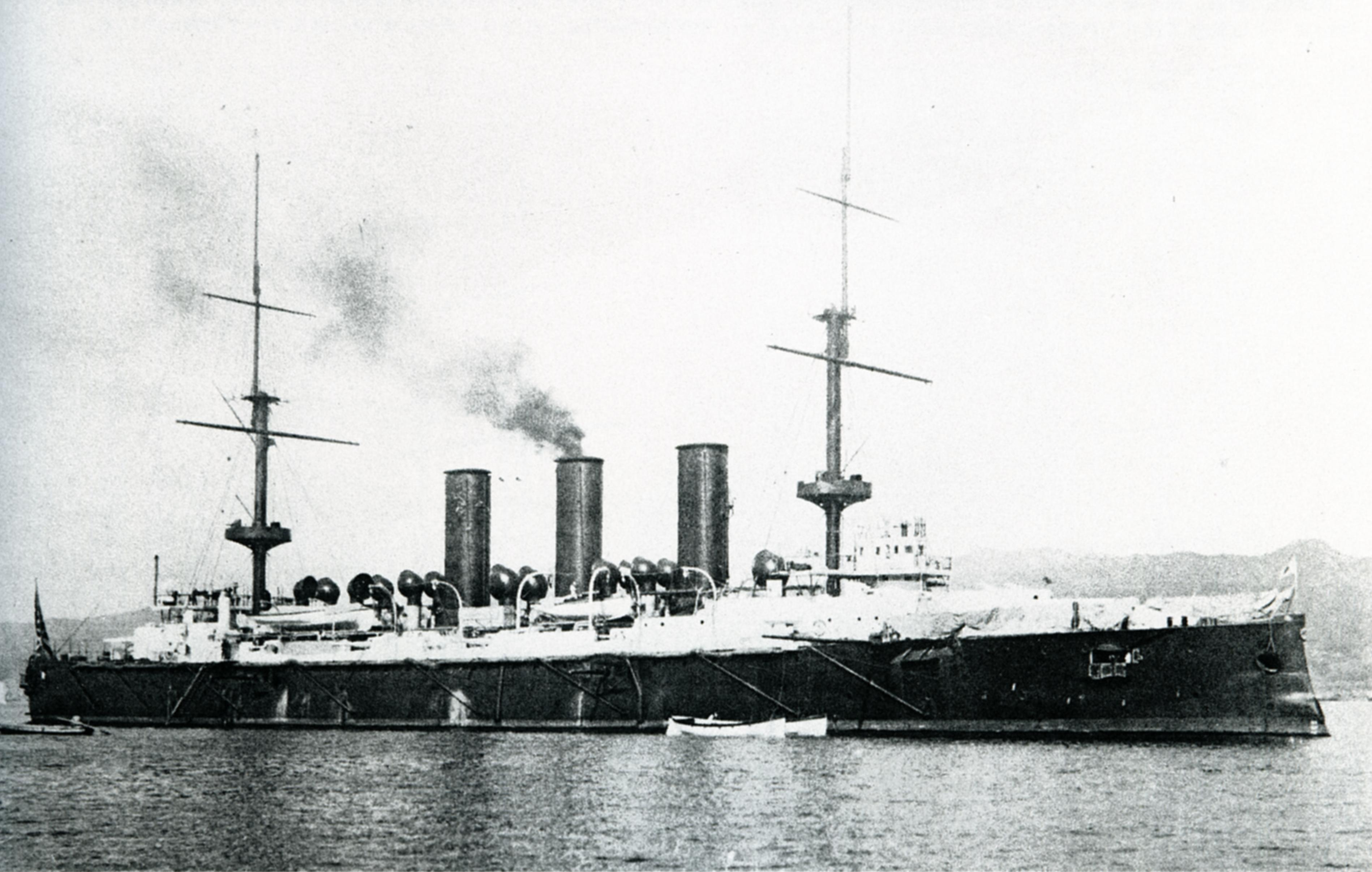 IJN Yakumo at Kobe